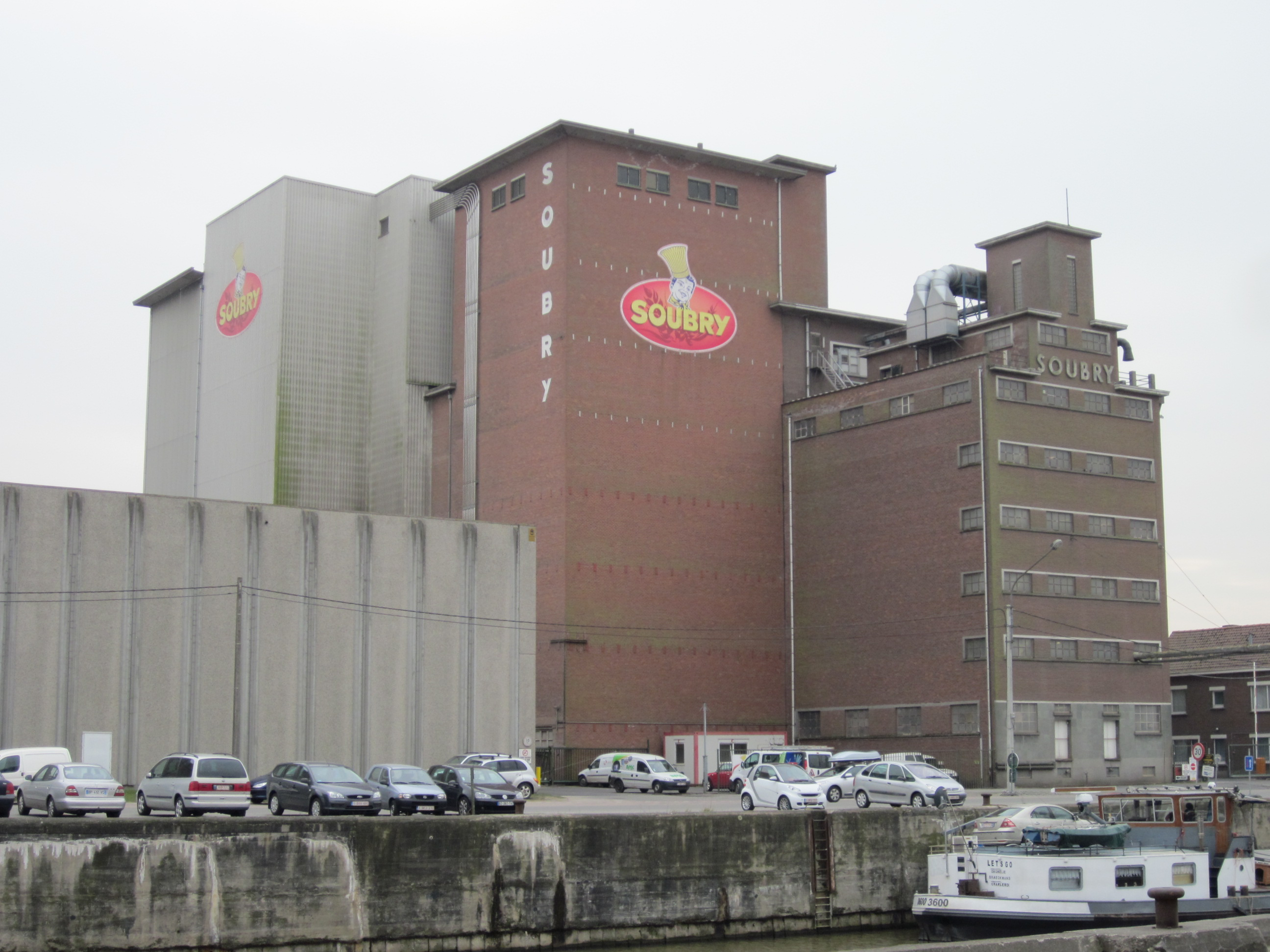 Deegwarenfabriek Soubry, Trakelweg Roeselare